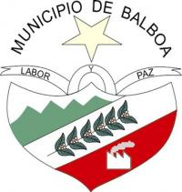 Escudo oficial municipio de Balboa Risaralda